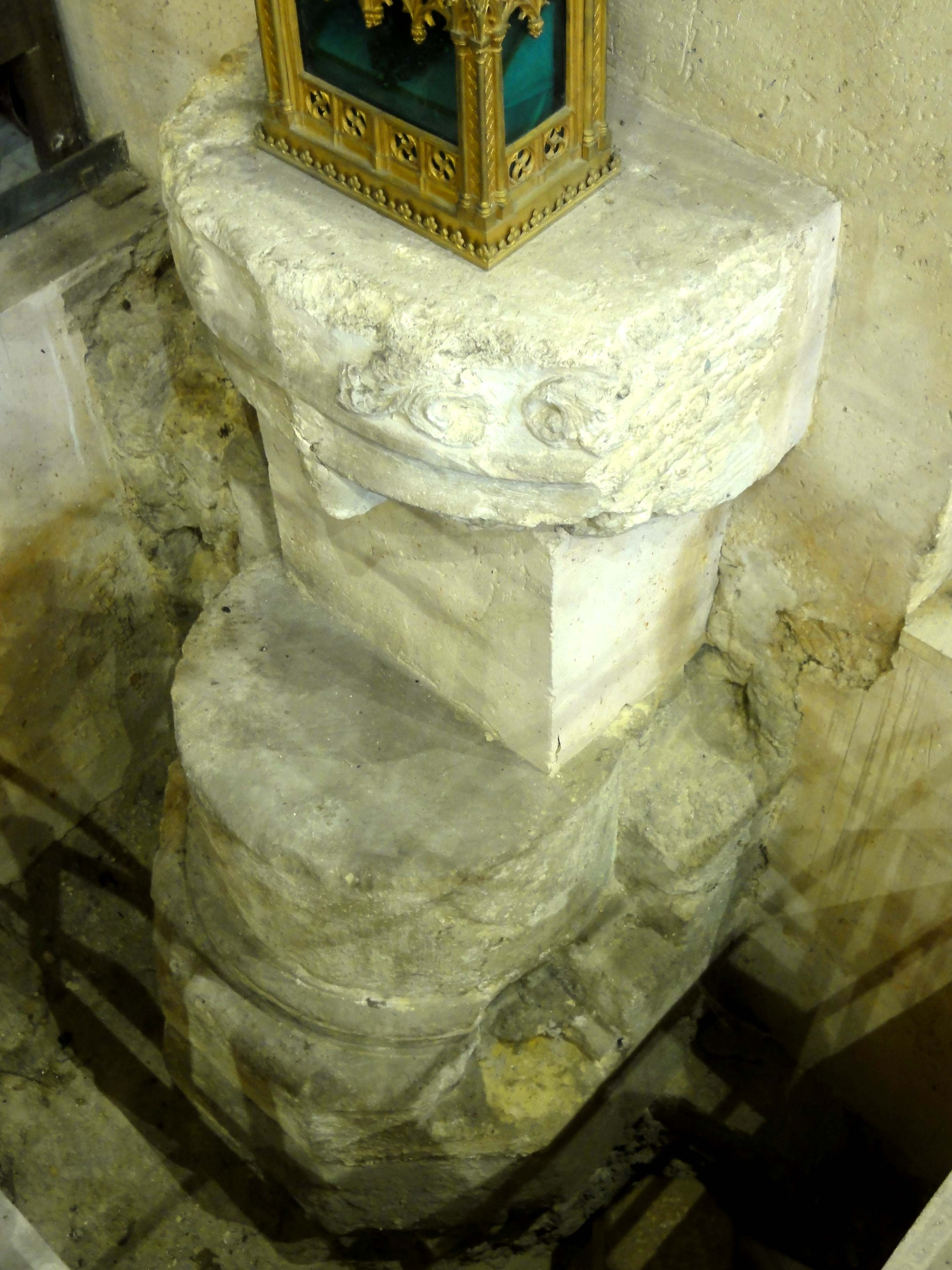 Base anciennement enterrée d'un pilier de la nef gothique disparue.